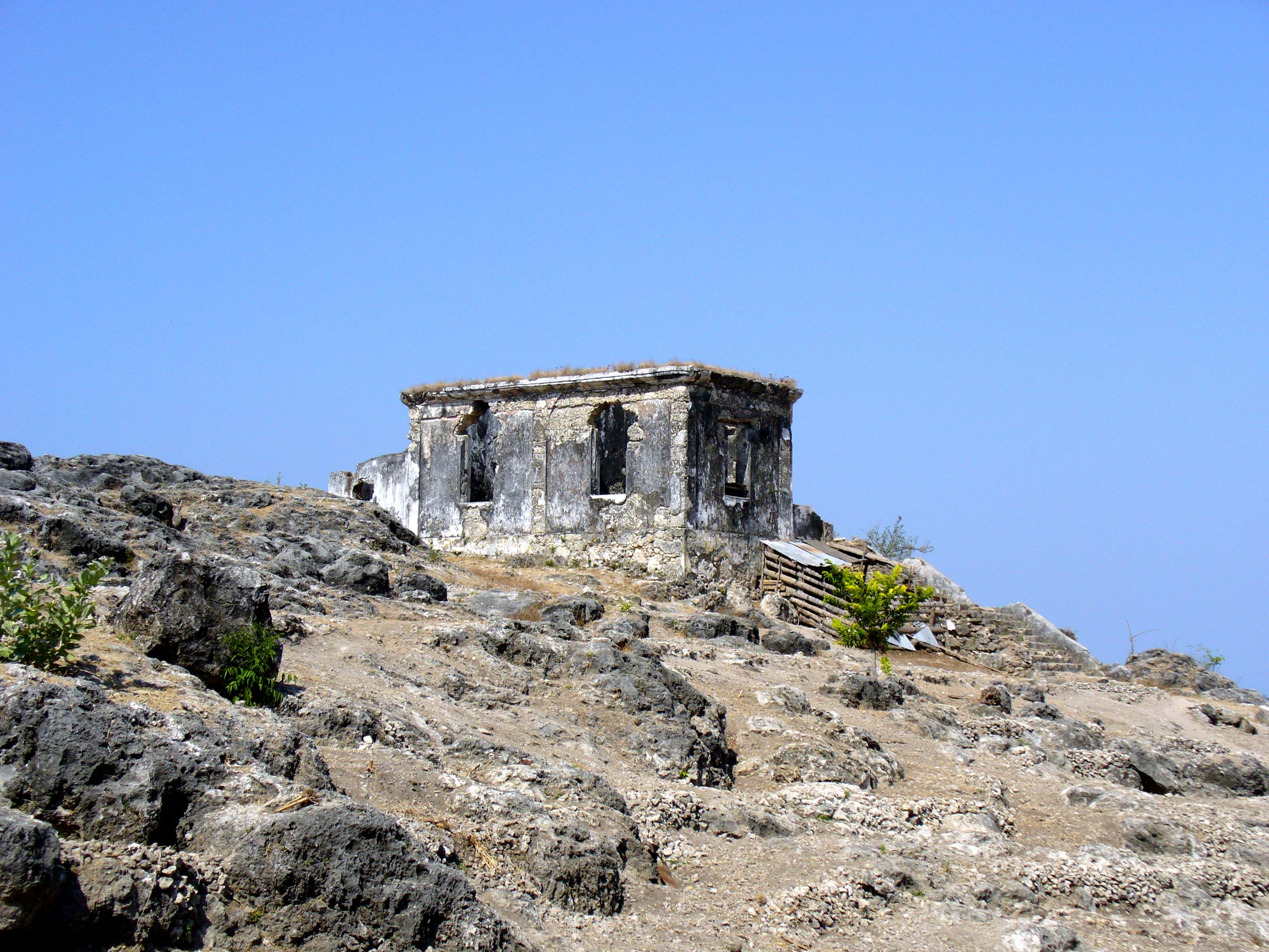 Baucau, East Timor